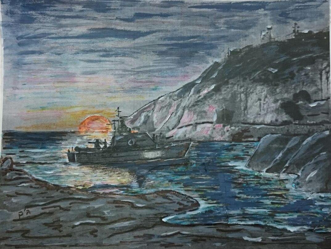 ציור טרפדת במארב למחבלים בקרבת ראש הנקרה